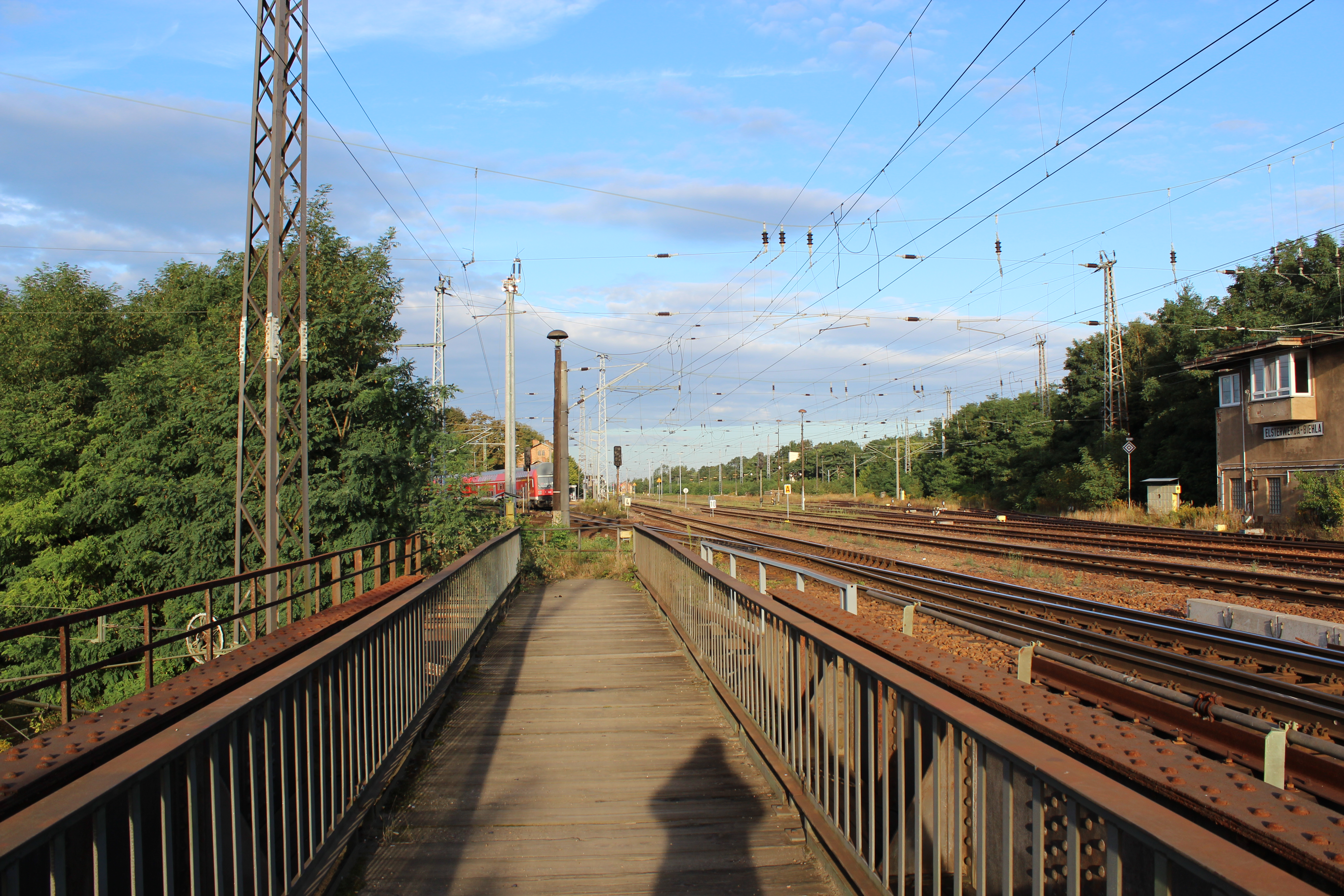 Bahnhof Elsterwerda-Biehla vom Kreuzungsbauwerk aus gesehen.